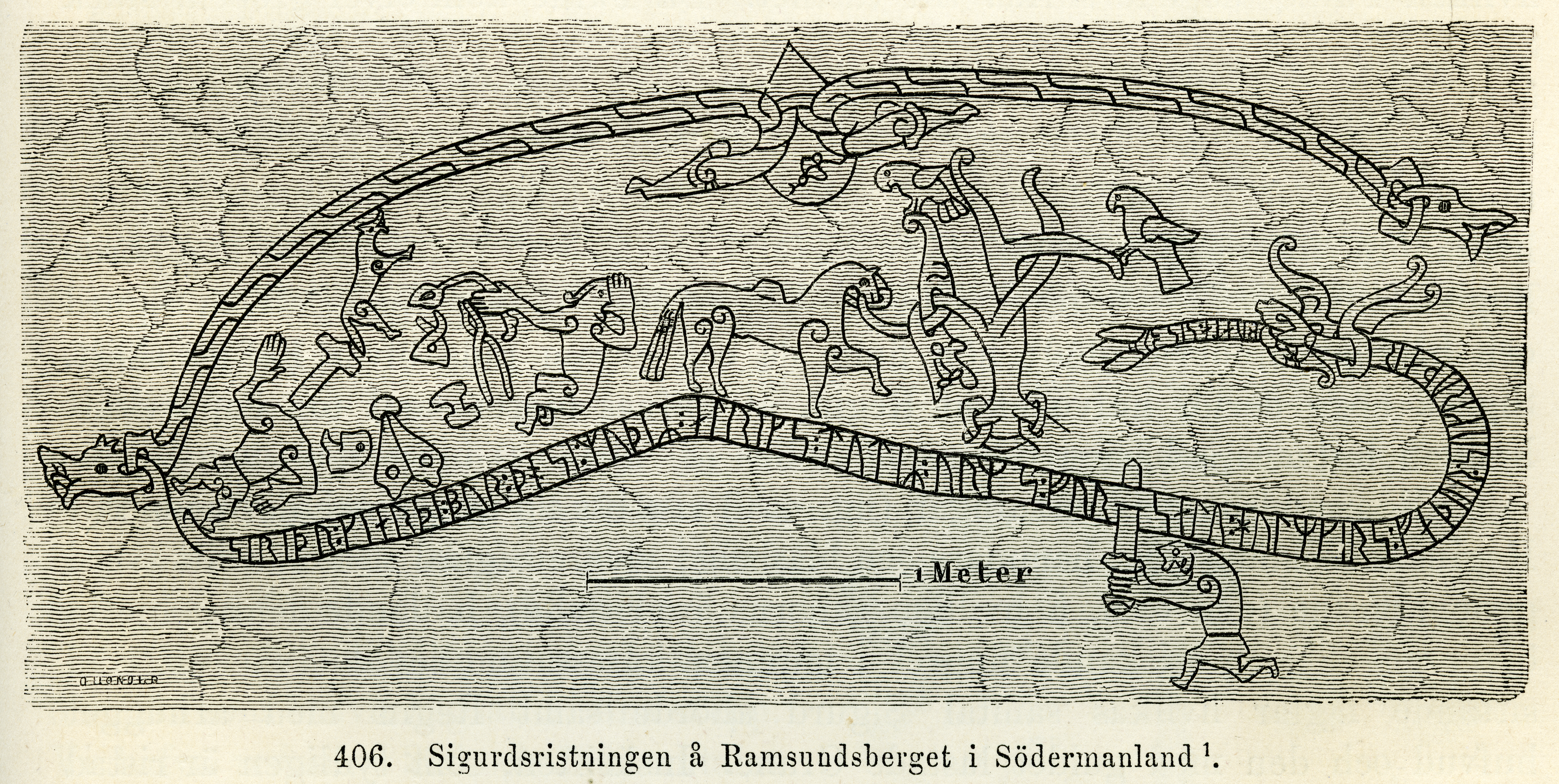 Ramsundsristningen eller Sigurdsristningen på Ramsundsberget (Sö 101, RAÄ-nr Jäder 39:1), Jäders socken, Österrekarne härad, Eskilstuna kommun, Södermanlands län, Södermanland, Sverige. Träsnitt figur 406 på sidan 349 i Sveriges hednatid, samt medeltid, förra skedet, från år 1060 till år 1350 (1877) av Oscar Montelius.